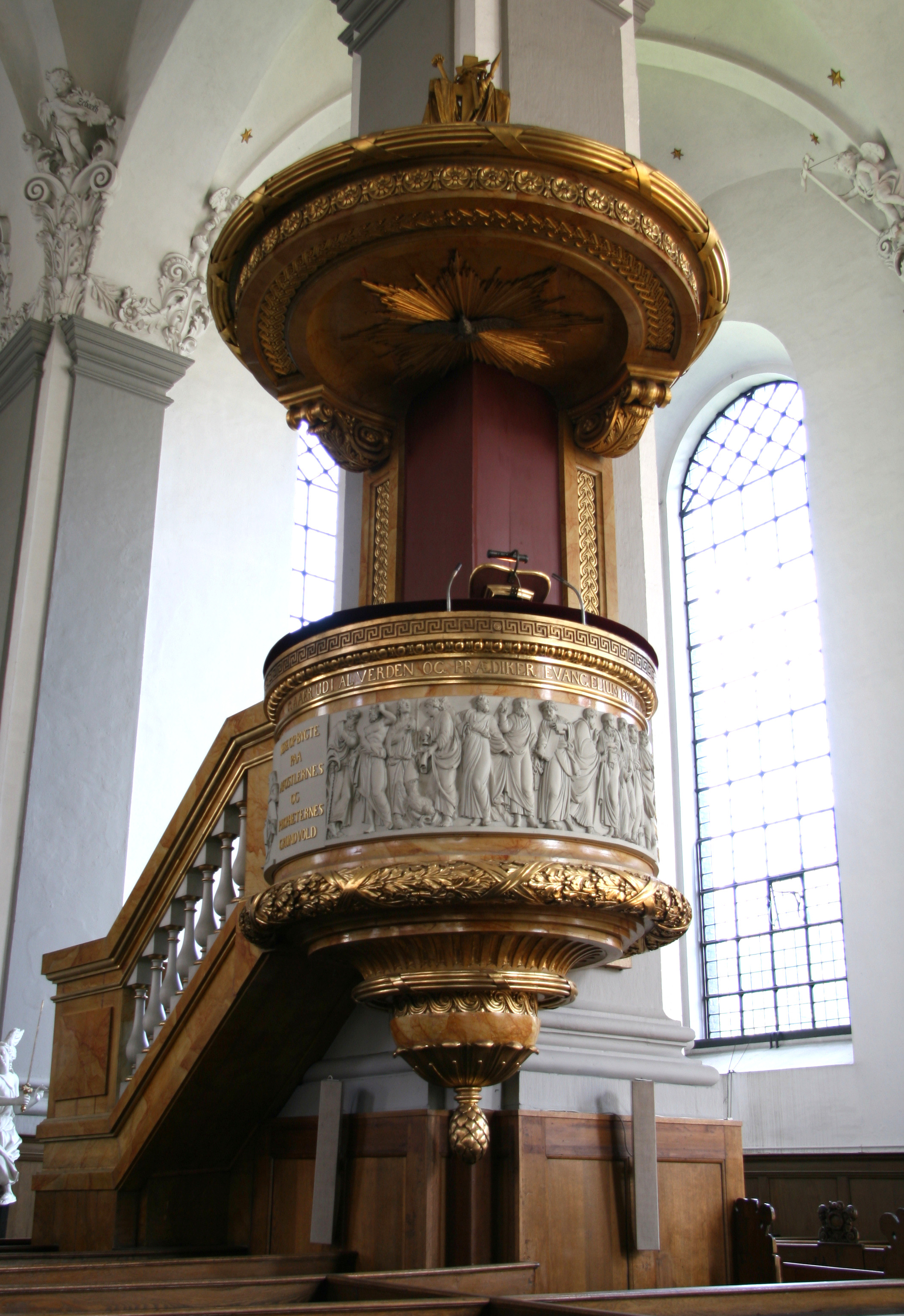 Vor Frelser Kirke (Church of Our Saviour), Copenhagen, Denmark. Pulpit.